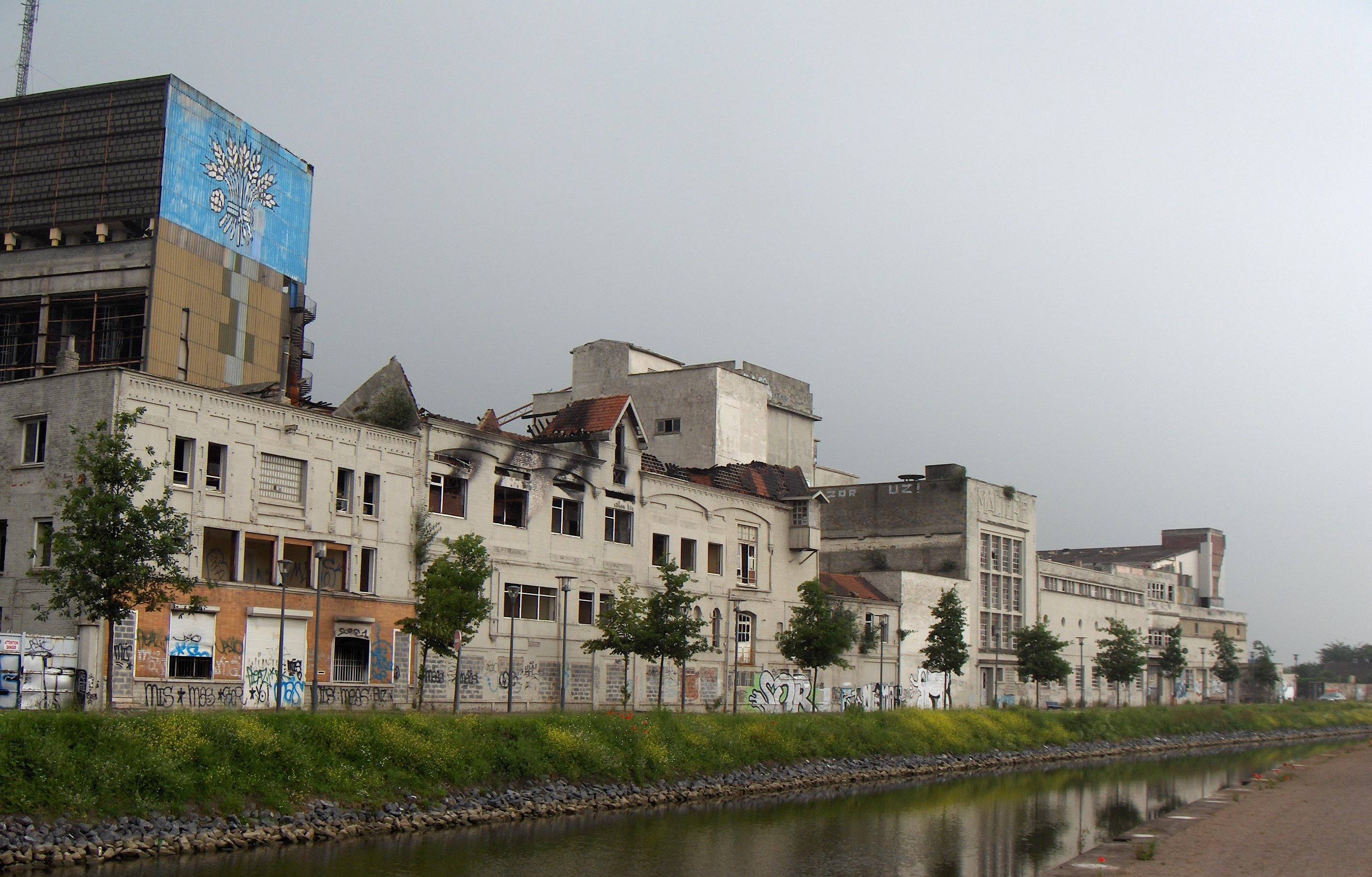 Roubaix (France, dépt. Nord), Quai d'Anvers, ancienne brasserie Terken (fermée en 2004), au bord du canal de Roubaix.